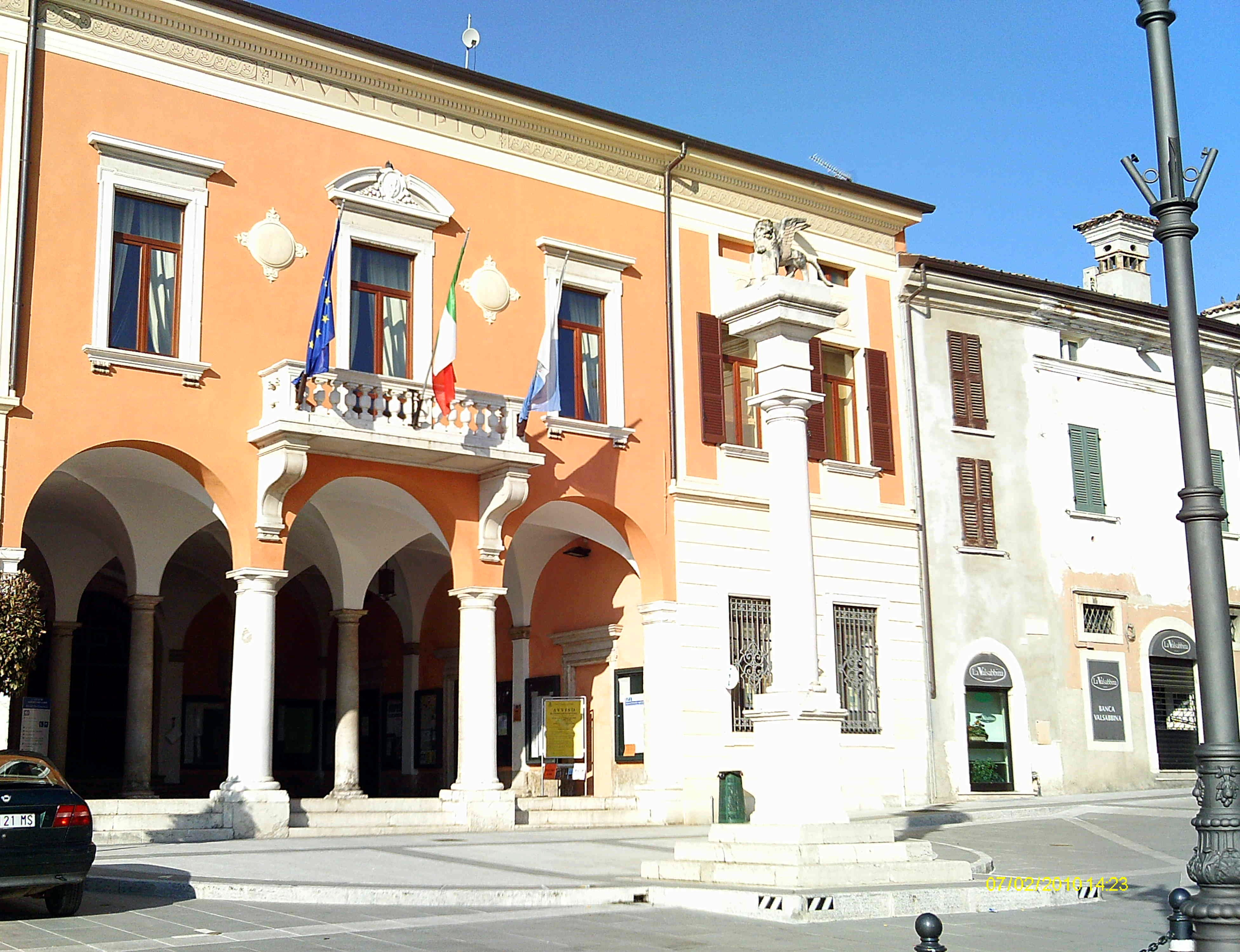 Palazzo comunale di Lonato del Garda